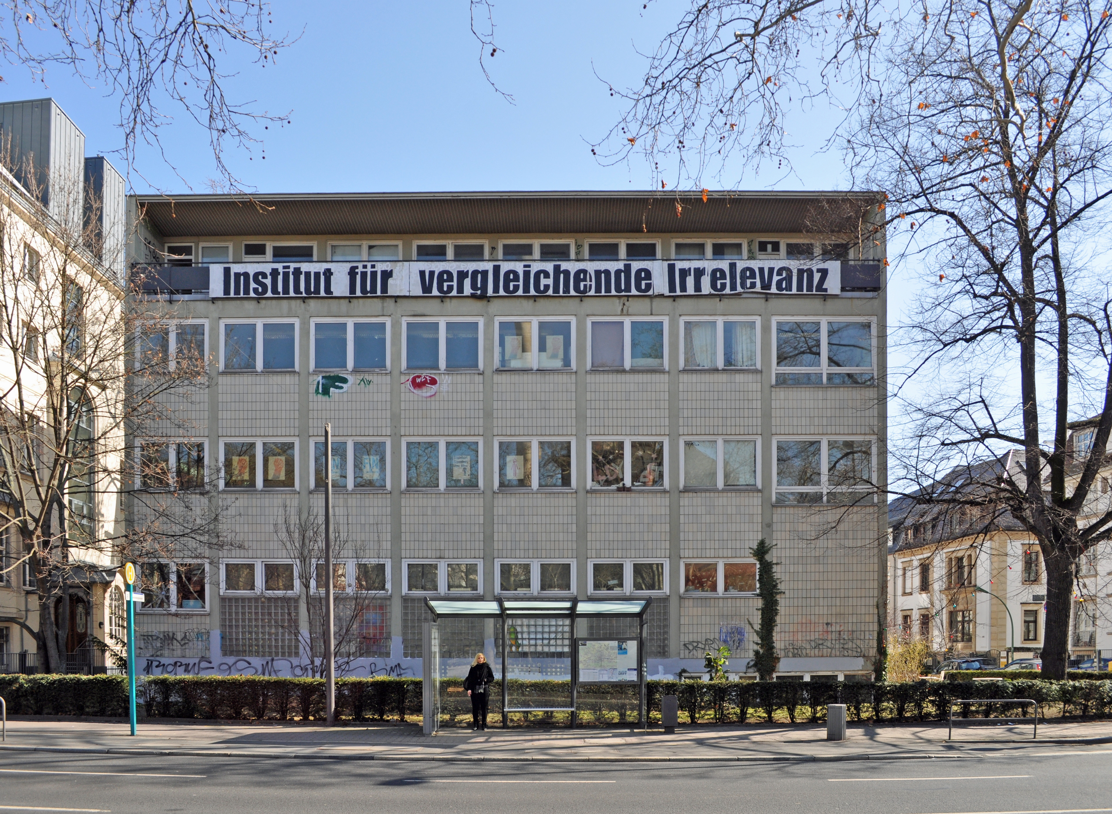 Frankfurt, Bockenheim, besetztes Haus "Institut für vergleichende Irrelevanz"